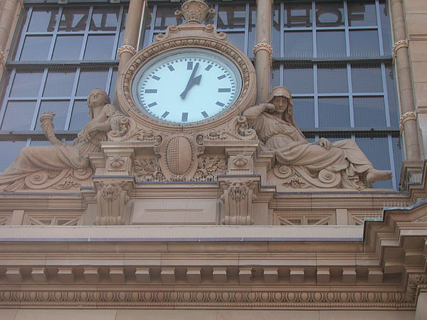 Uhr an der Ostseite des Frankfurter Hauptbahnhofs